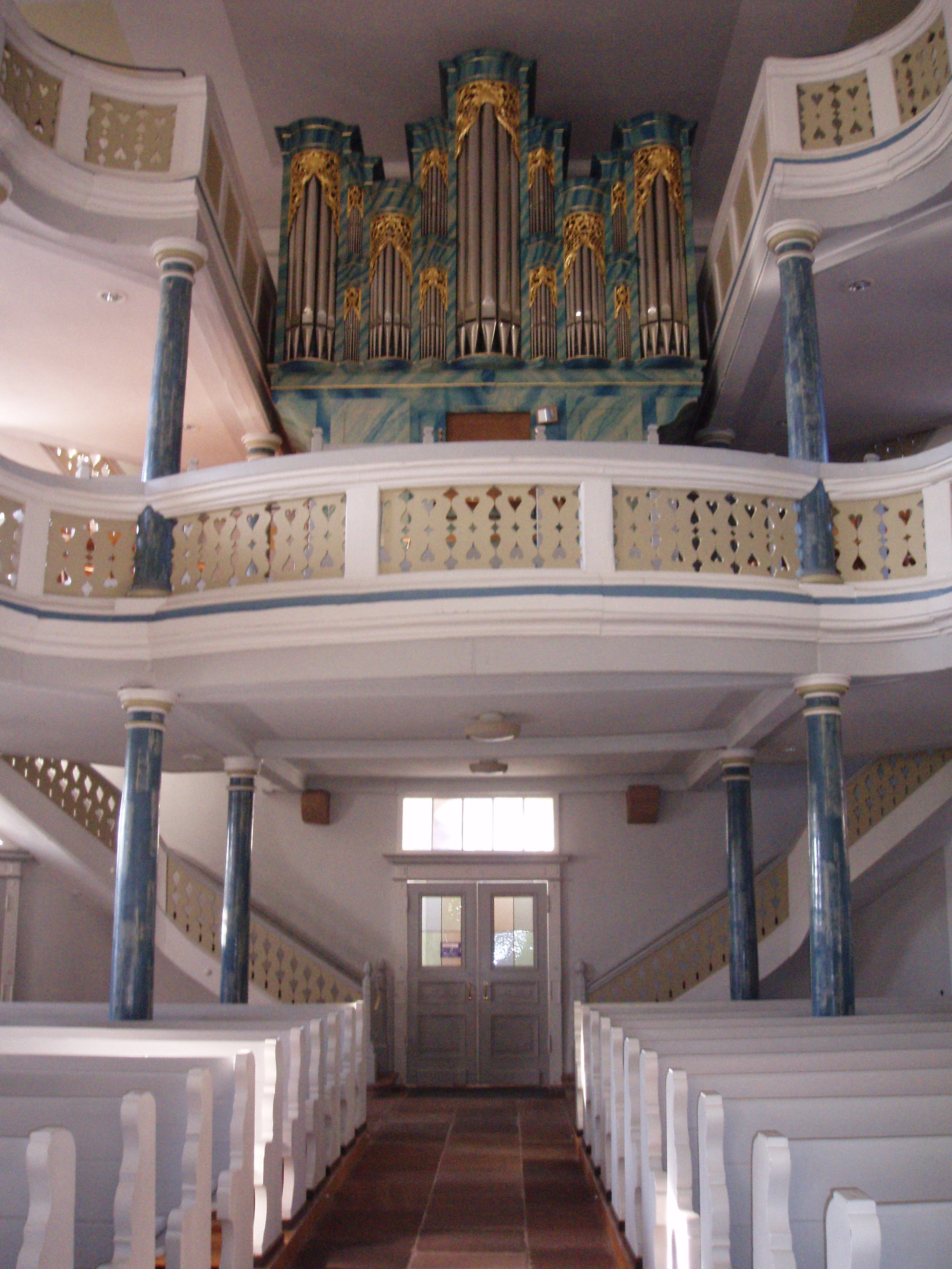 Inneres der Evangelischen Stadtkirche in Altensteig mit der Rohlf-Orgel (erbaut 2002 in altem Gehäuse)